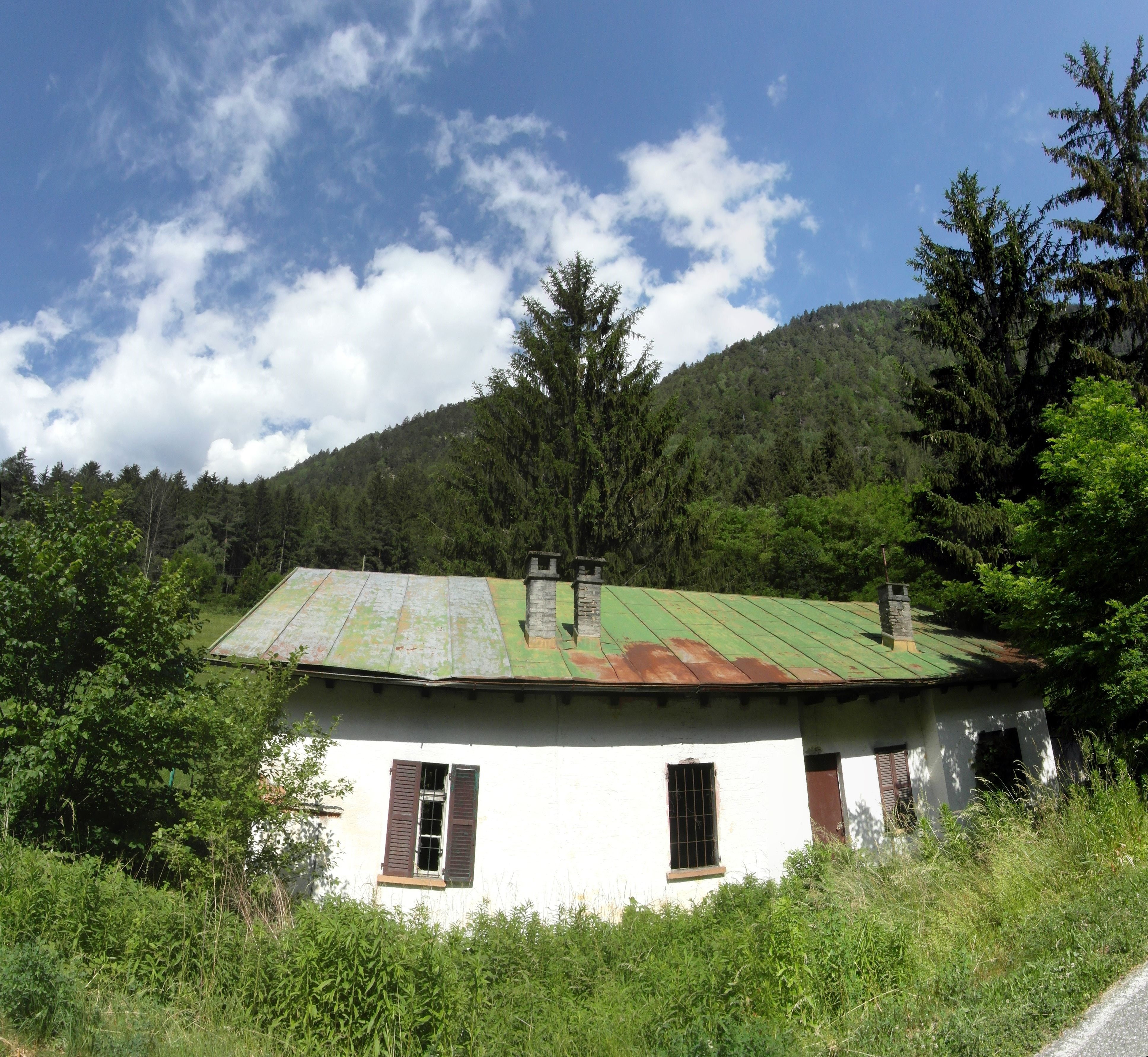 Sbarramento Chiusa di Rio